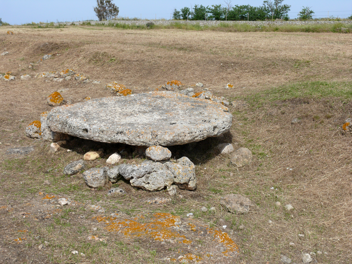 Altare prenuragico di Monte D' Accoddi (Sassari, Sardegna)